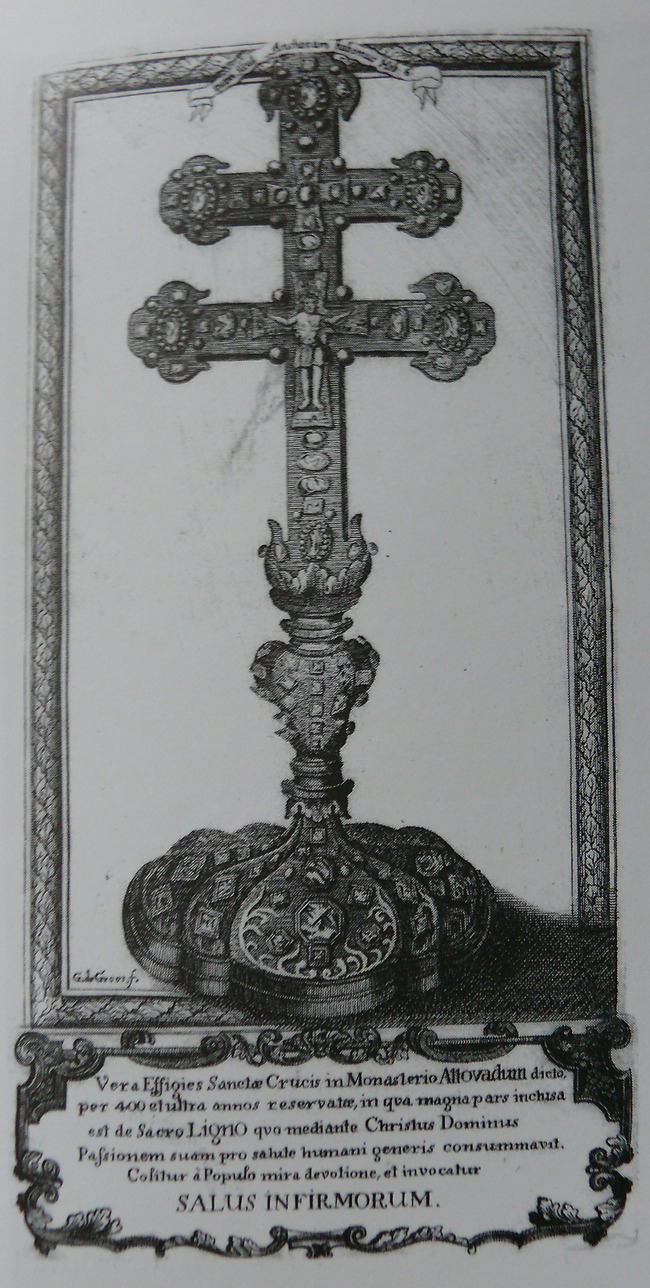 Závišův kříž - rytina